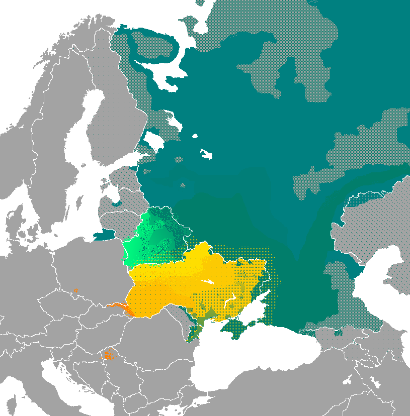 Lenguas eslavas orientales. Ruso Bielorruso Ucraniano Rusino